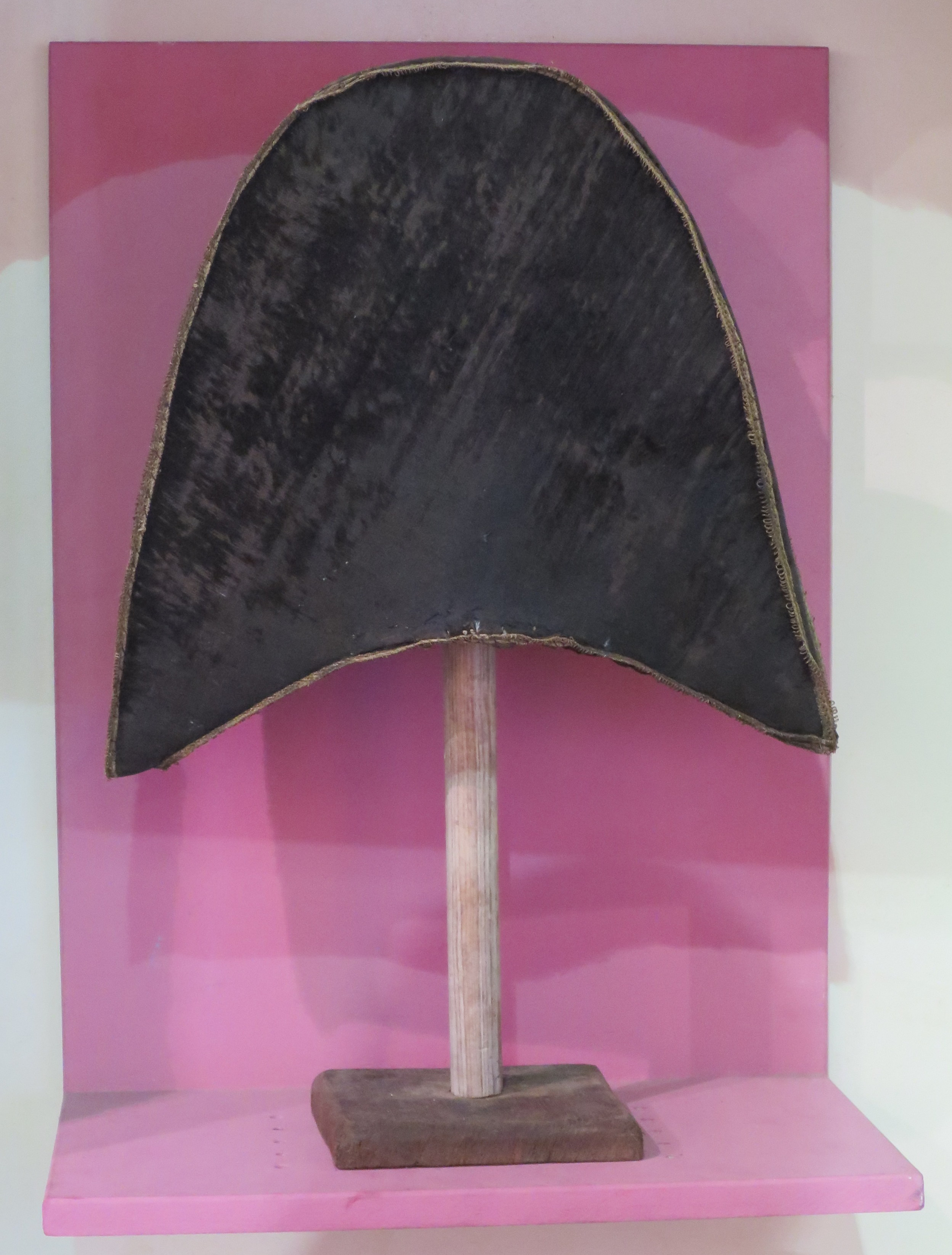 cappello bicorno appartenuto a Tadini